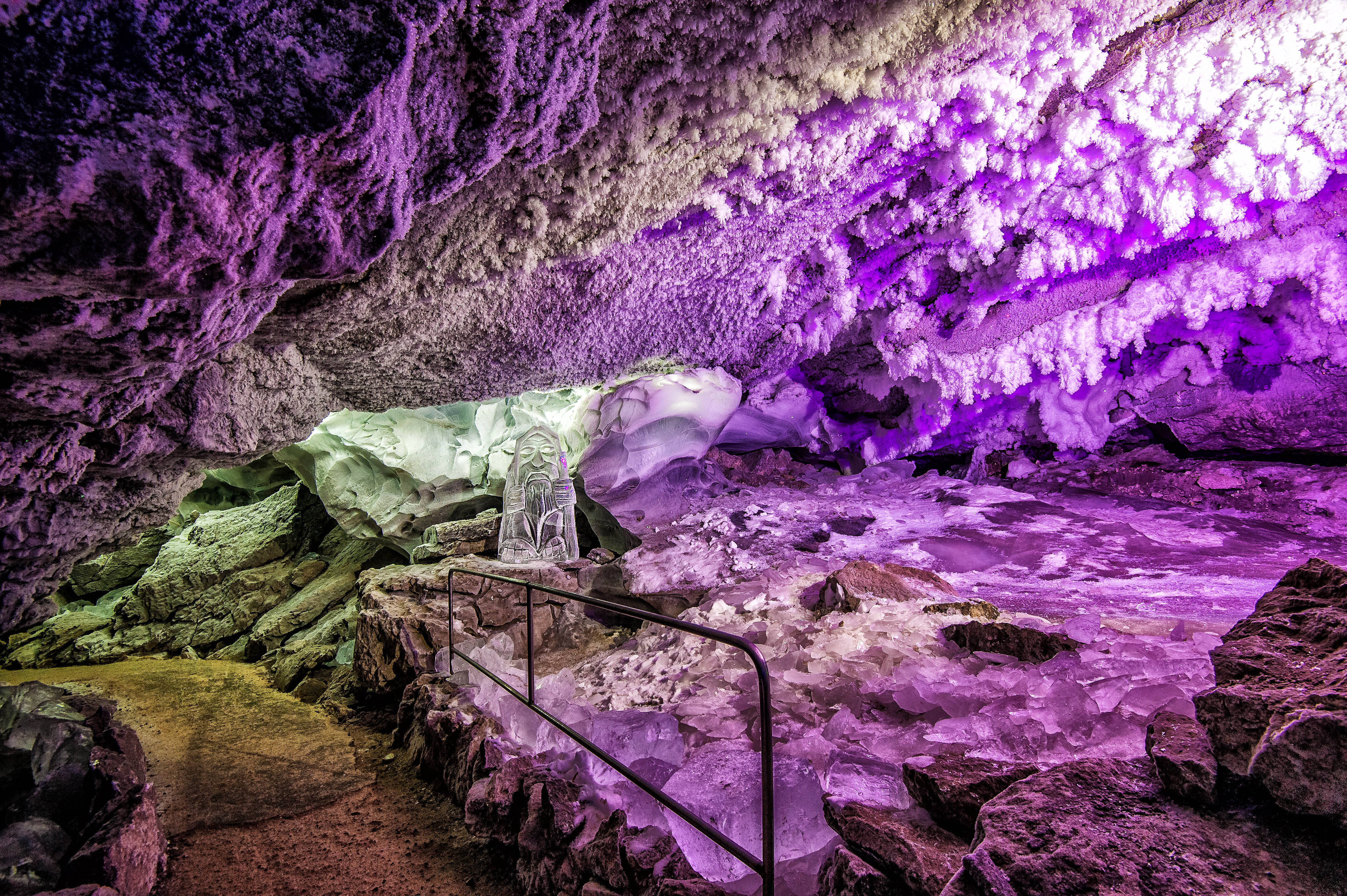 Ледяная гора и Кунгурская ледяная пещера, Кунгурский район This image is related to the protected area of Russia number 5910237